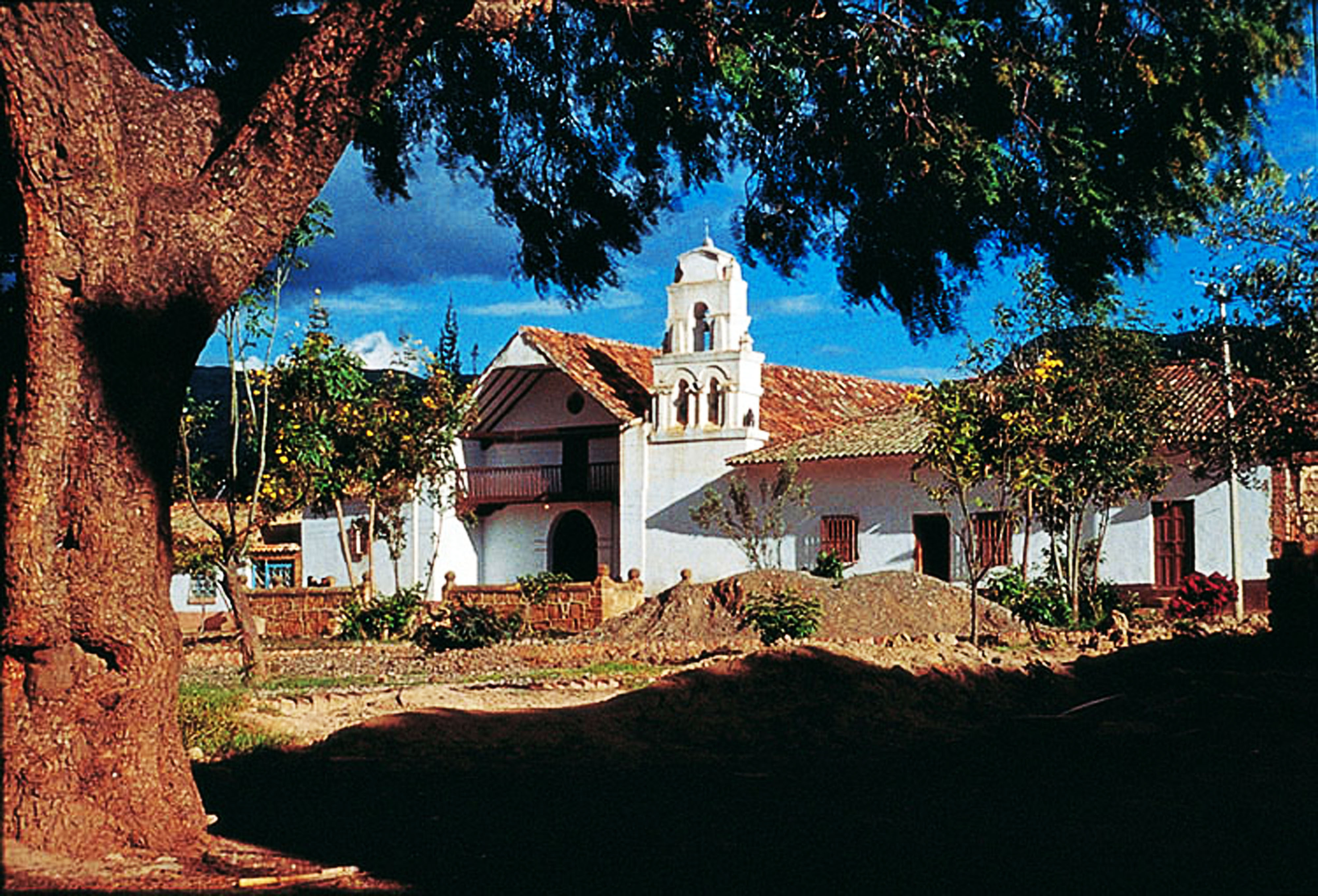 iglesia doctrinea de Sáchica esta imagen es un scaneo de una imagen tomada por mi famila hace algunos años esta iglesia fue construida en la época colonial hace mas de 500 años esta como alguna otras esta rodeada con una muralla en piedra y al frene se encuentra una cruz de aproximadamente 3 metros